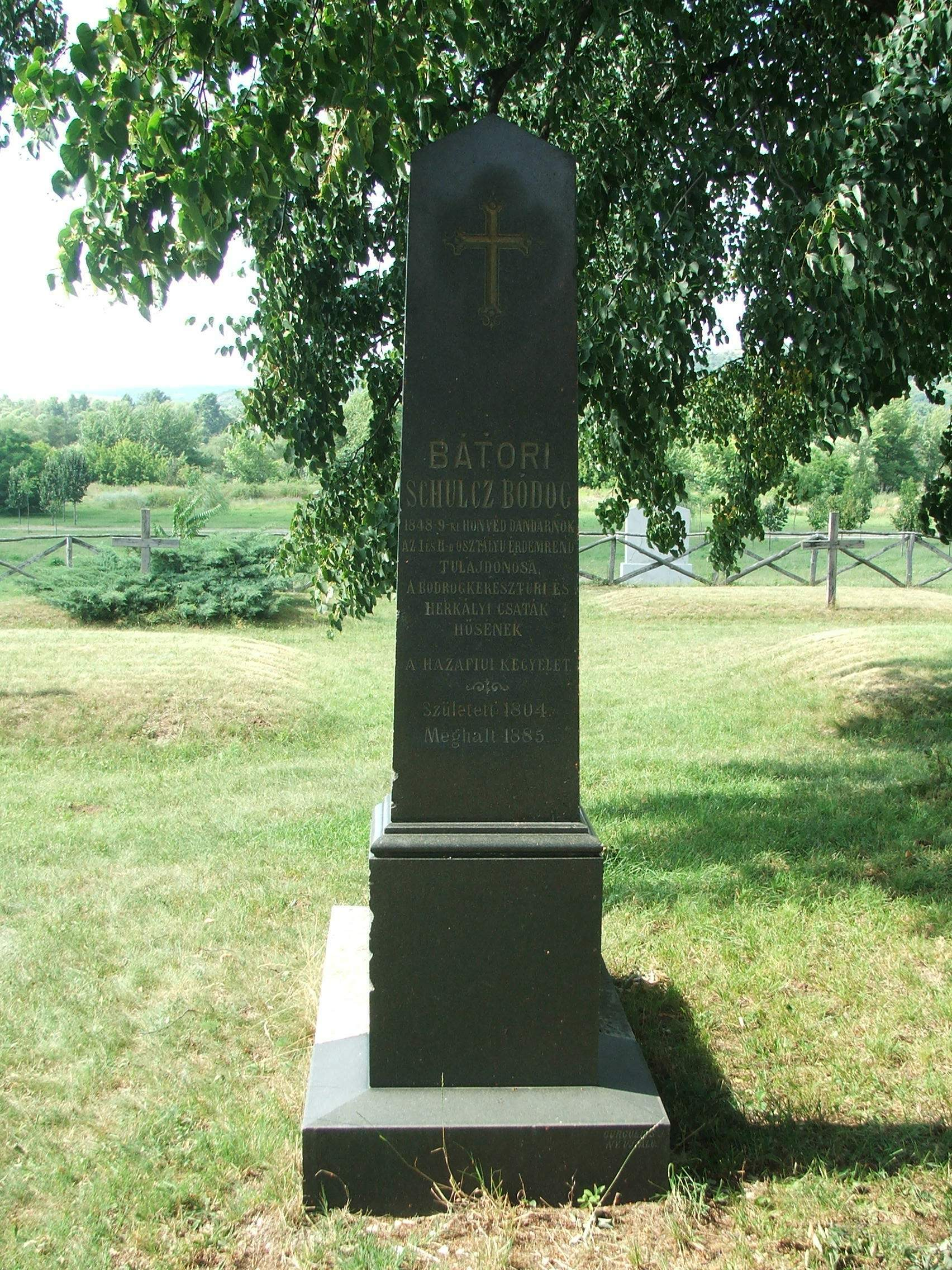 Tombstone of Bátori Schulcz Bódog in Esztergom-Szentgyörgymező